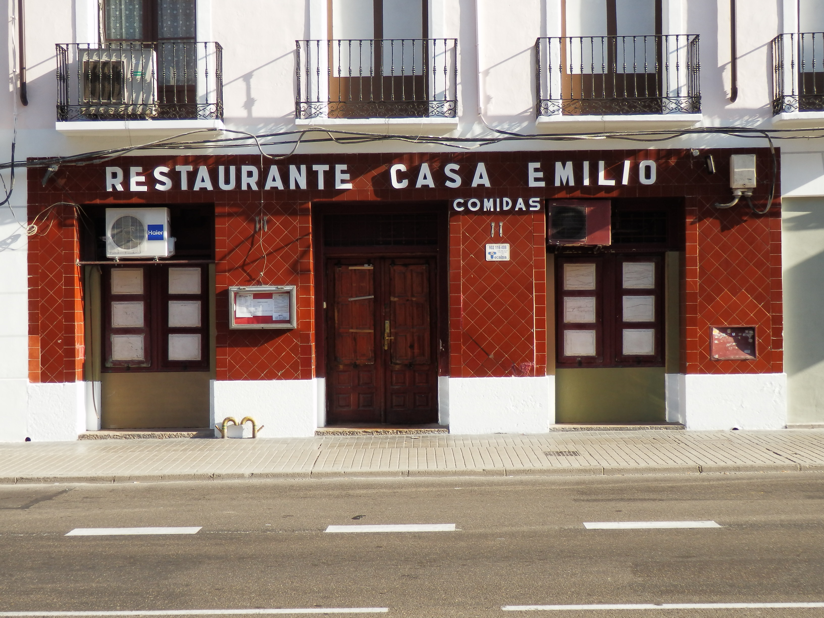 Restaurante Casa Emilio en Zaragoza